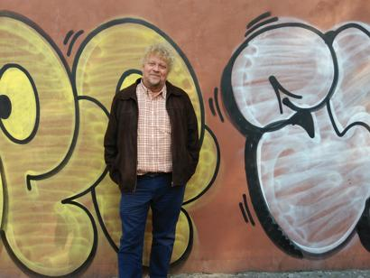 Stefan Gandler 2018 in Mexico City